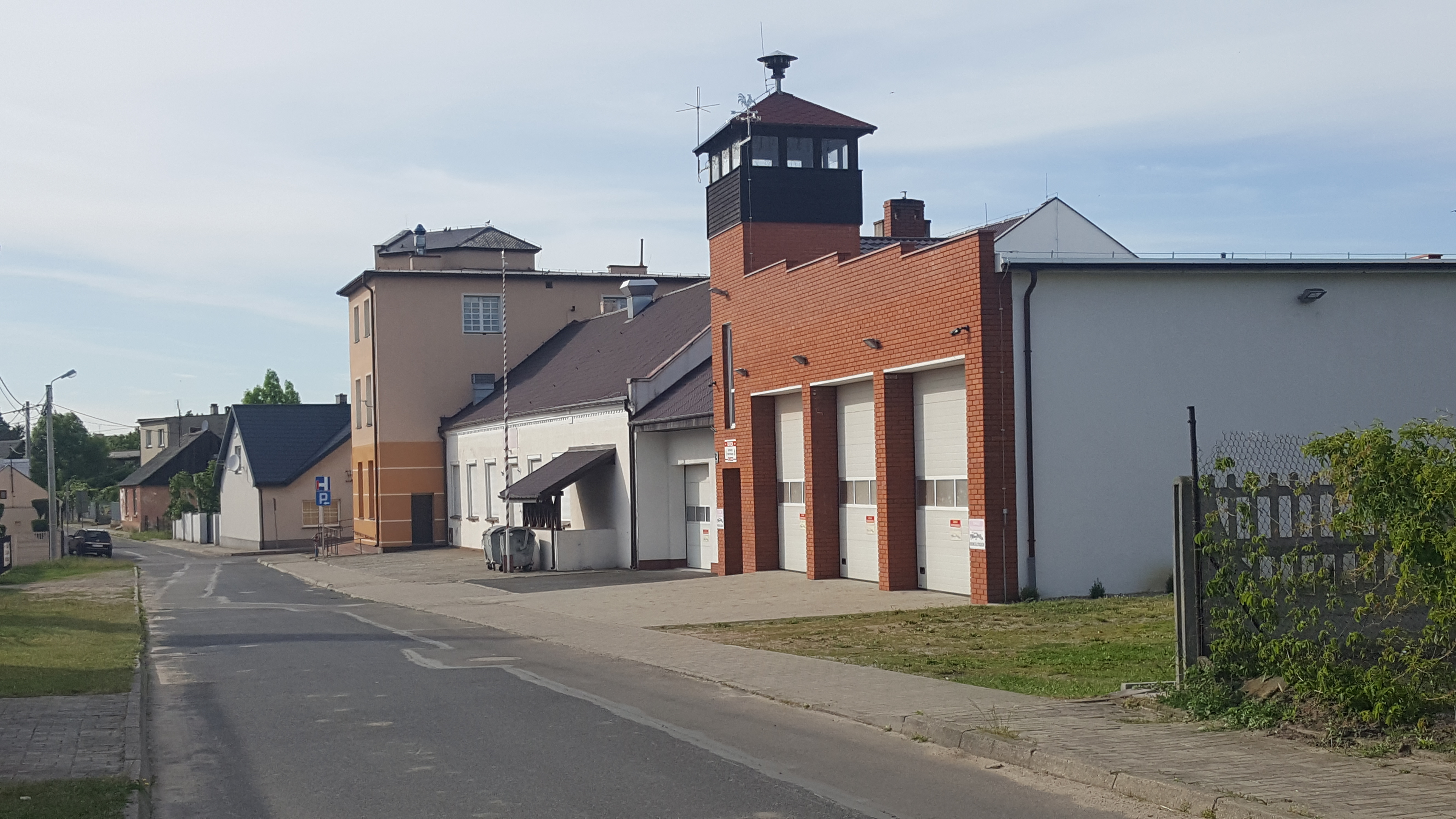 OSP w Choczu